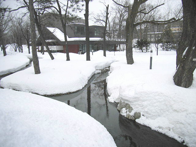 Sakushukotoni River, Sapporo, Japan.